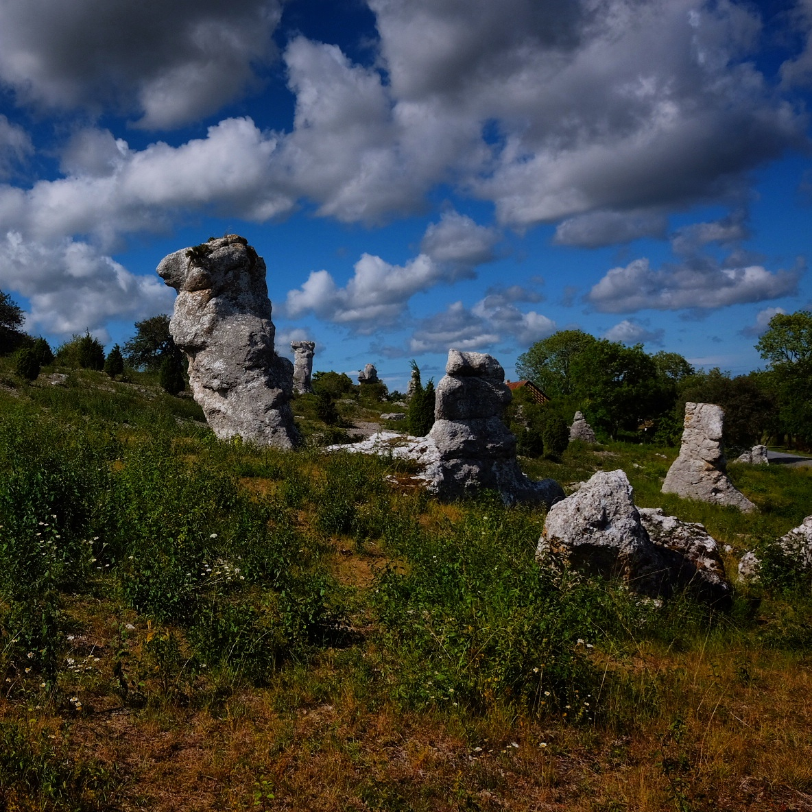 Raukar, Kyllaj.